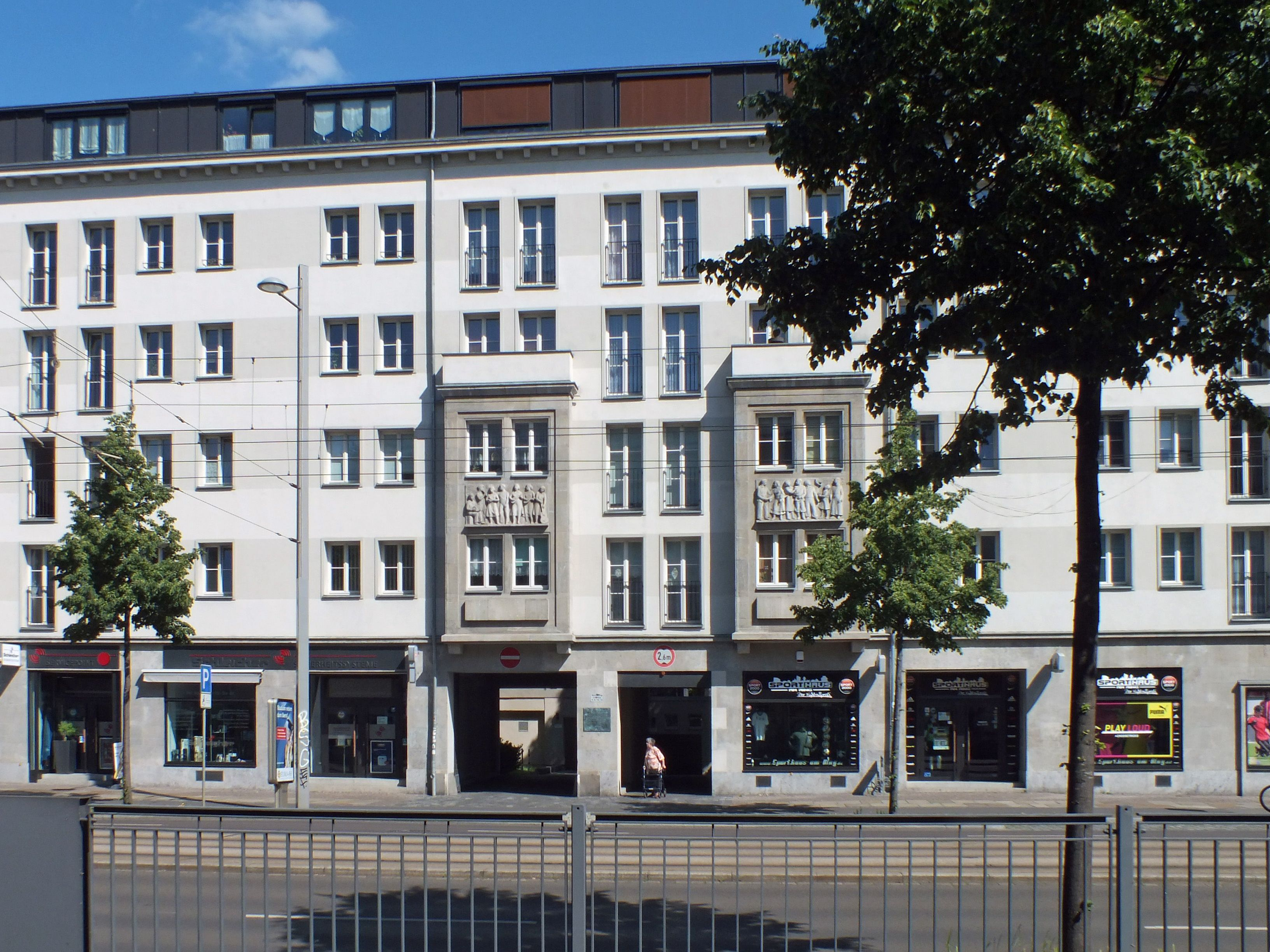 Ranstädter Steinweg 8 in Leipzig, ehemals Gasthof Goldene Laute und später Großgarage